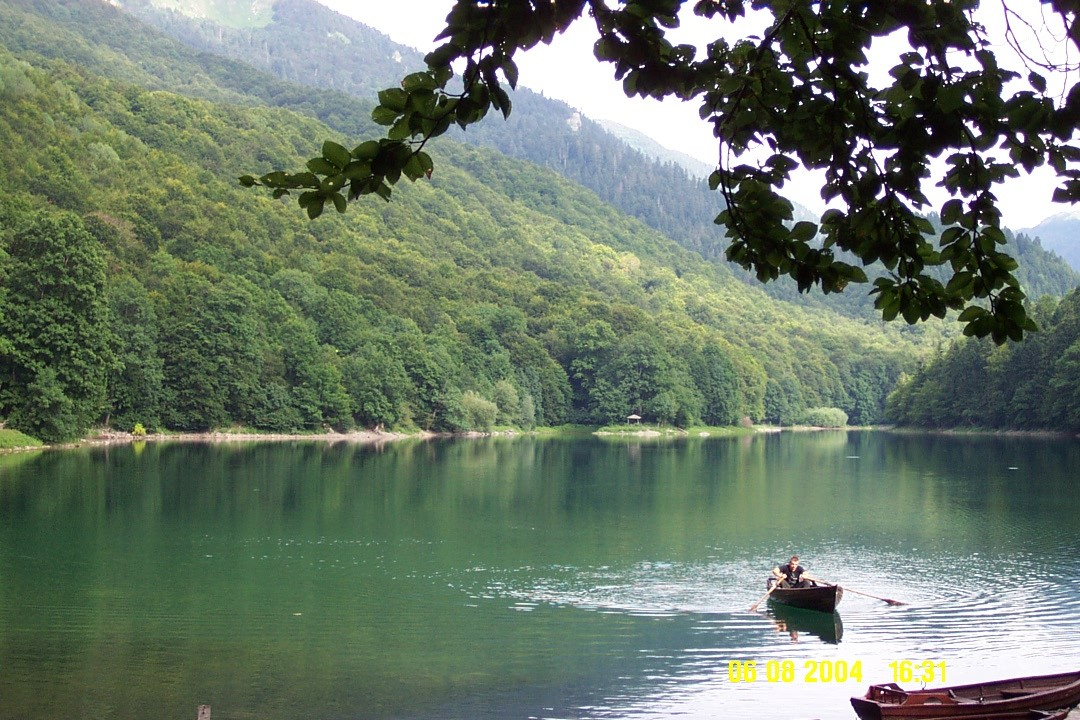 Biogradsko jezero v NP Biogradska Gora v CG